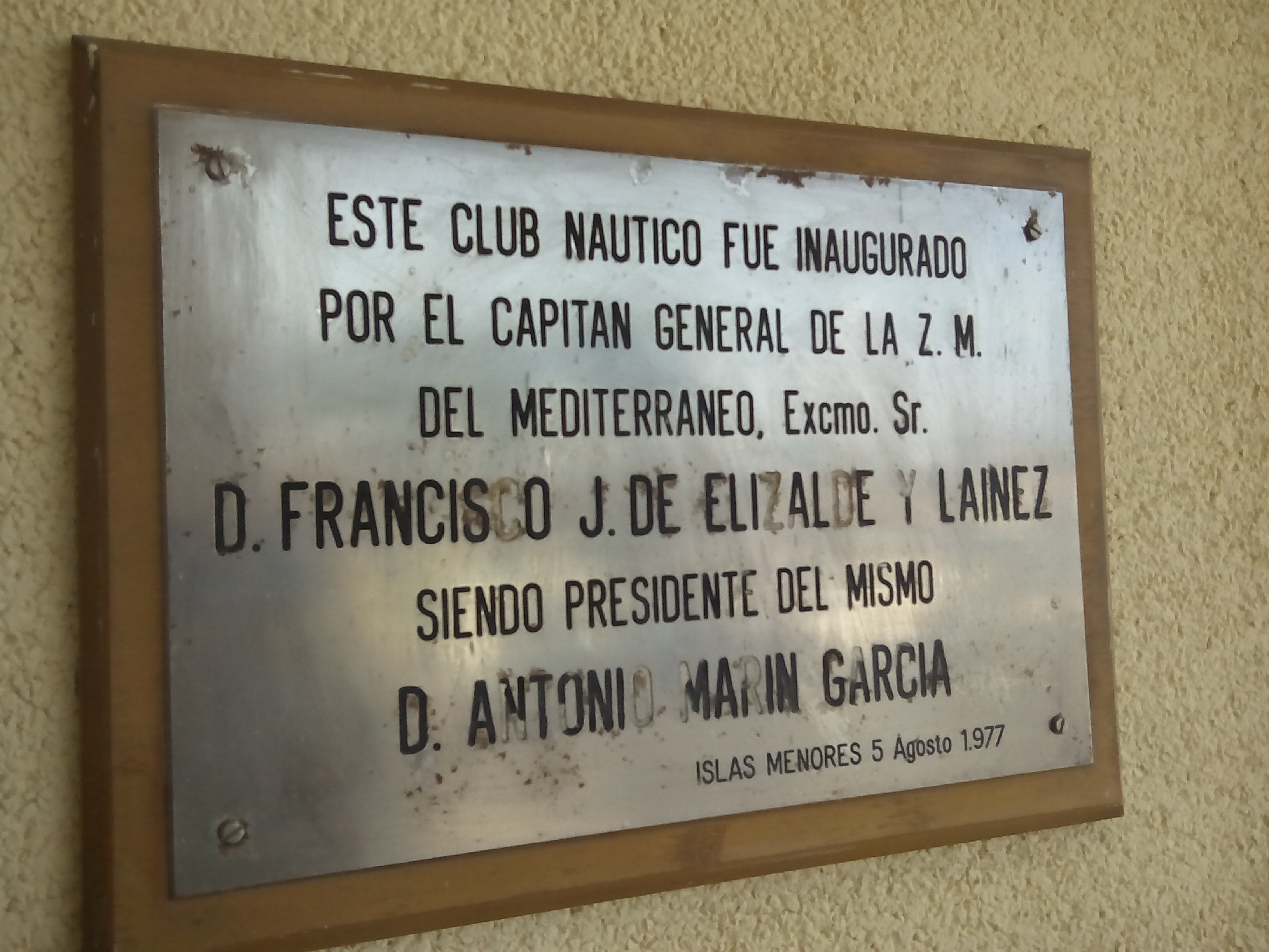 El 5 de Agosto de 1977, el almirante Elizalde inauguró el Club Náutico de Islas Menores